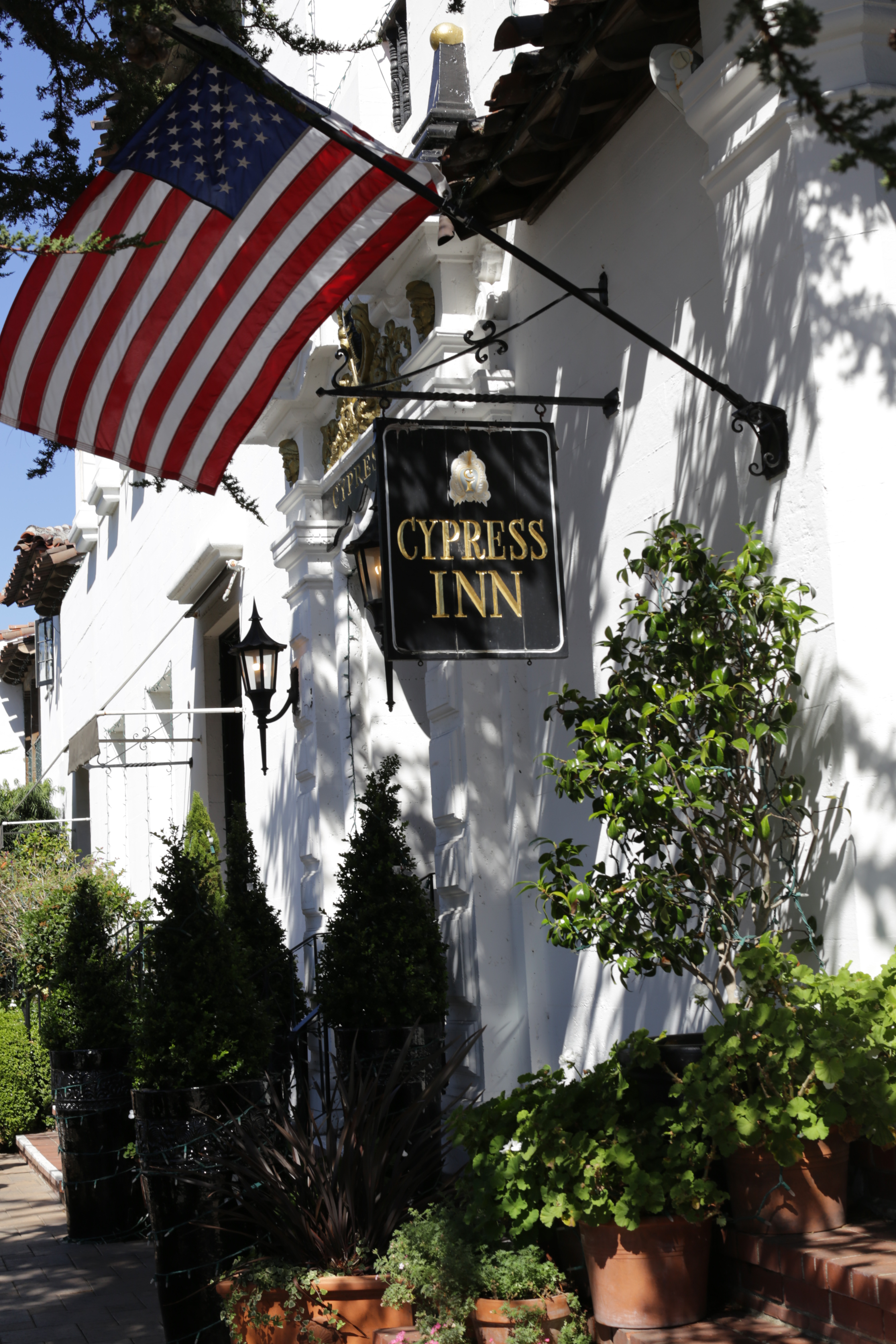 Hotel und Bar, betrieben von Doris Day und Dennis LeVette, Eingang von der Straße